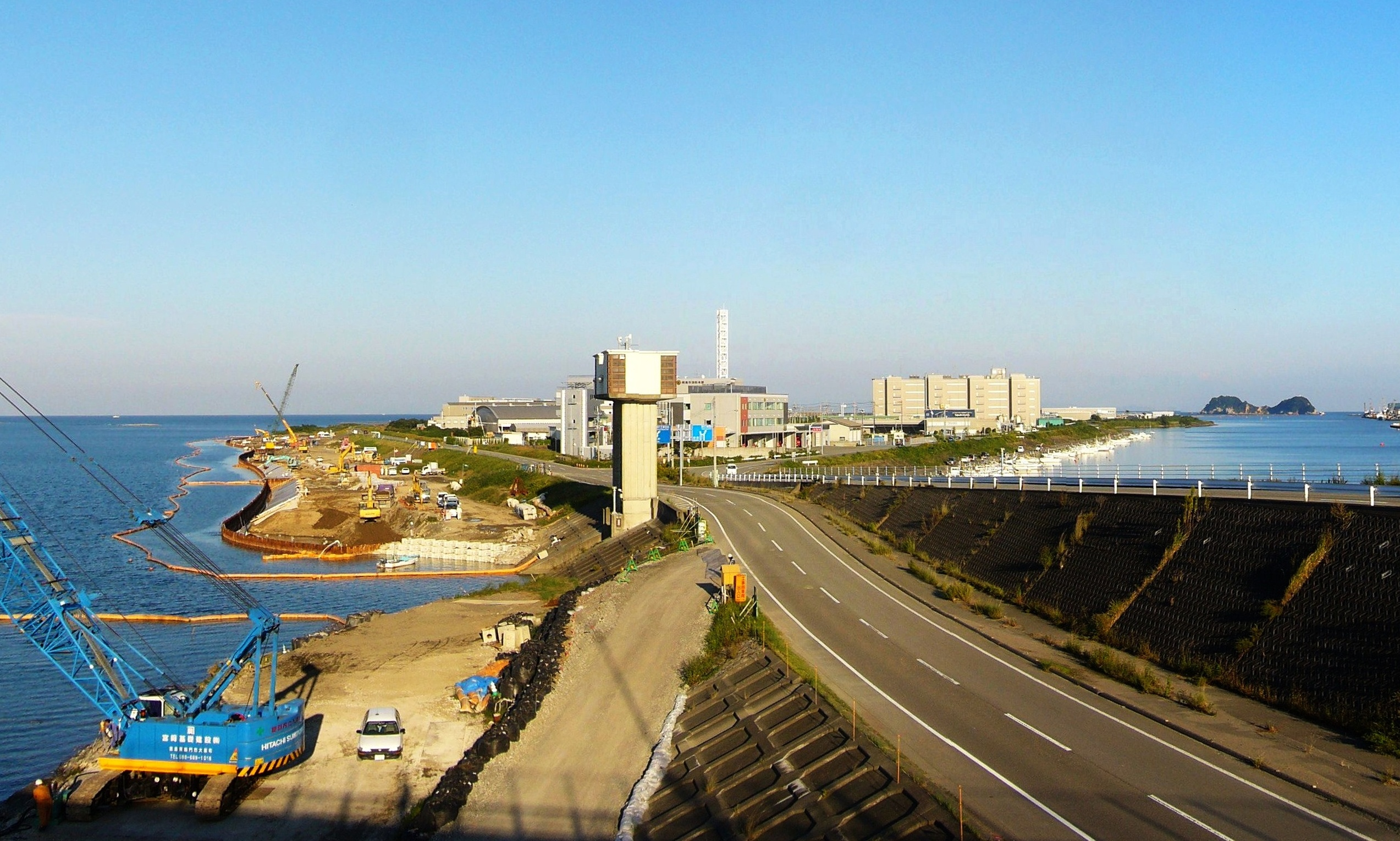 那賀川大橋より辰巳工業団地を望む